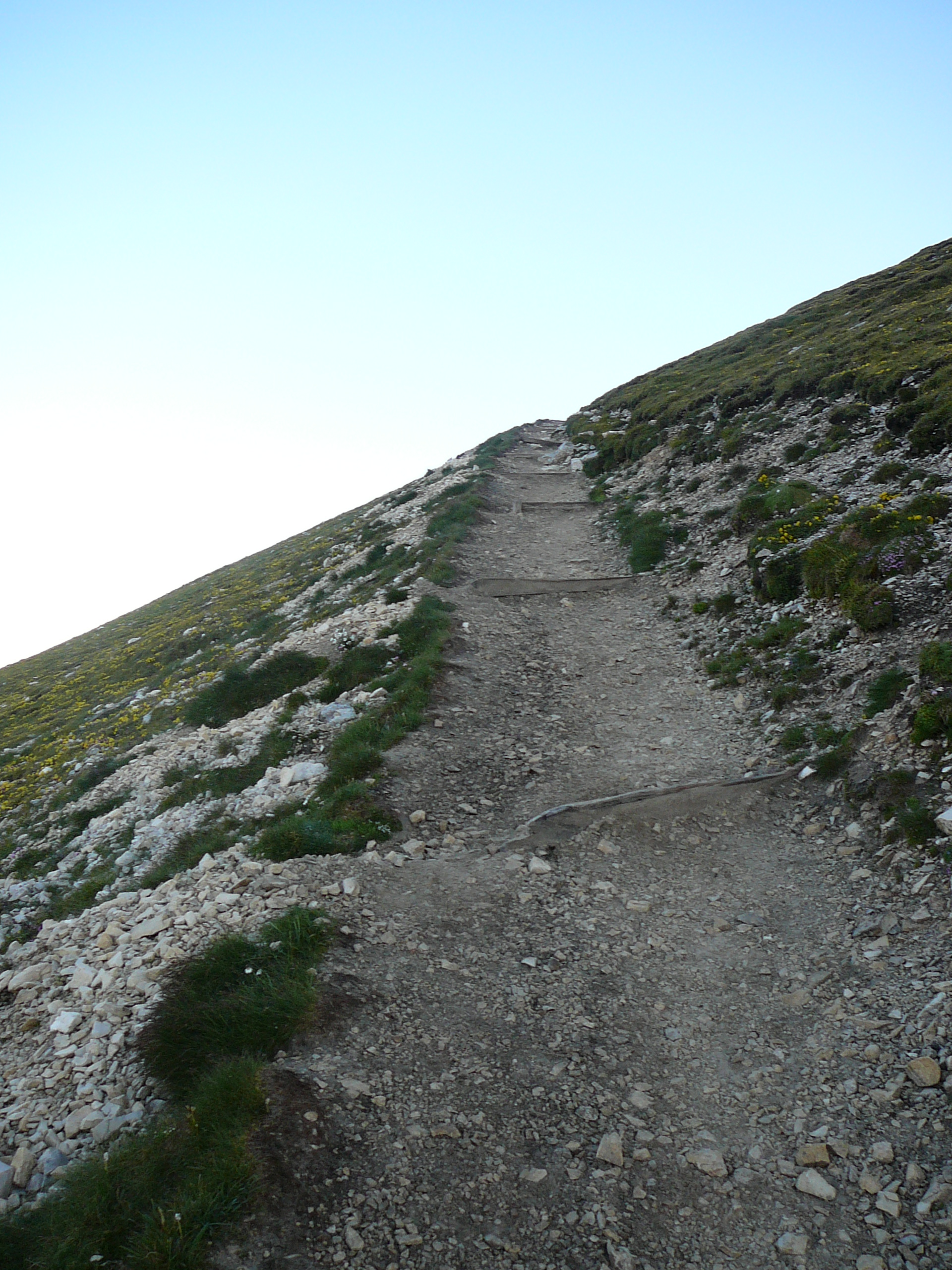 Picco di Vallandro - Tratto di salita